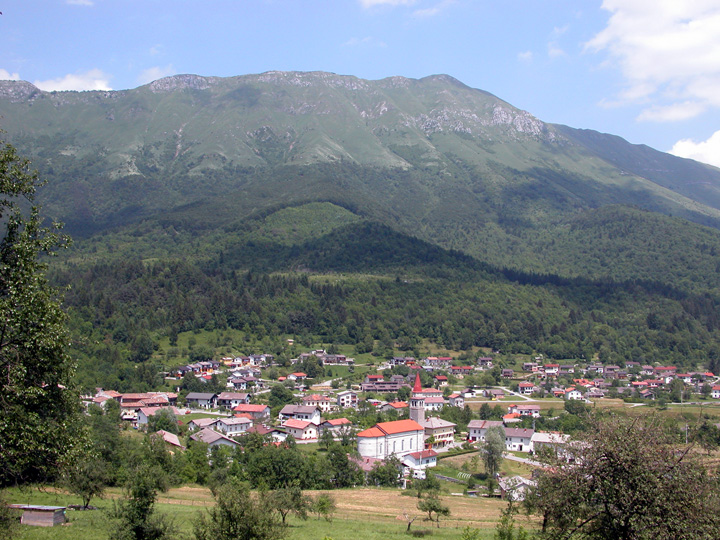 Breginj pod Stolom